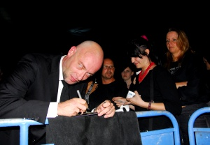 Der Graf von Unheilig gibt Autogramme nach dem Konzert